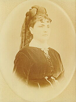 Rosa Vercellana "la Bela Rosin" (1833-1885), amante di re Vittorio Emanuele II.